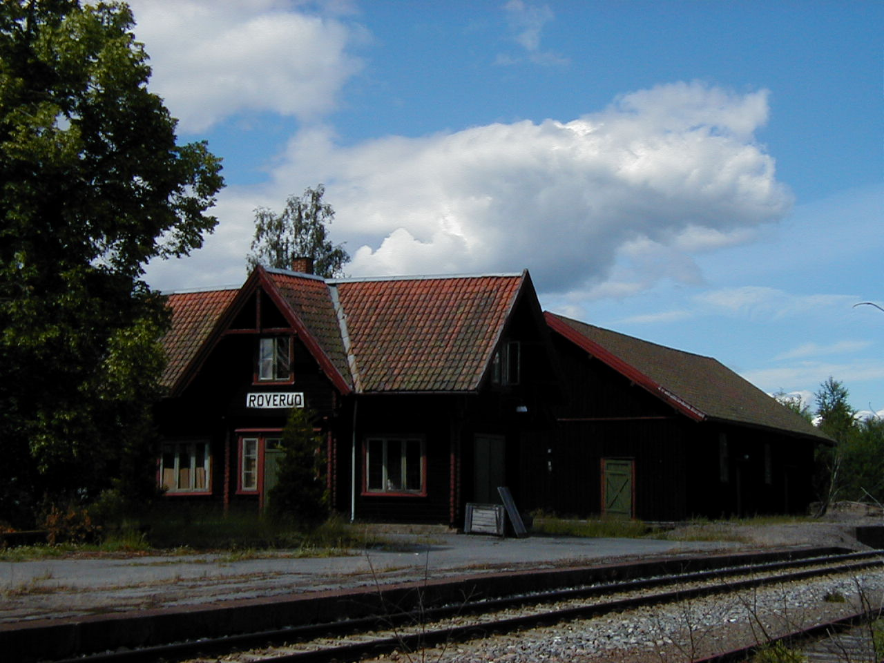 Ilgodshuset på Roverud stasjon. Stasjonsbygget ligger rett utenfor venstre bildekant.